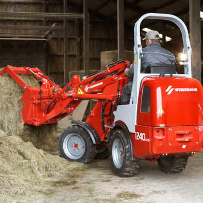 Wiellader Weidemann Hoftrac 1240